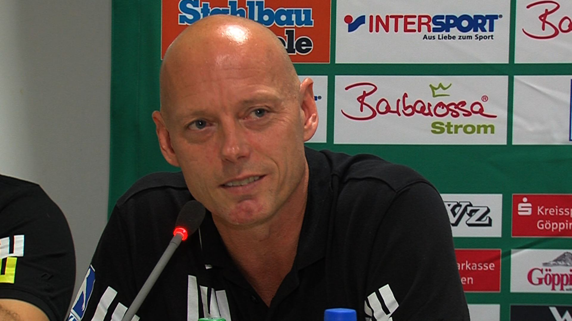 Foto Magnus Andersson